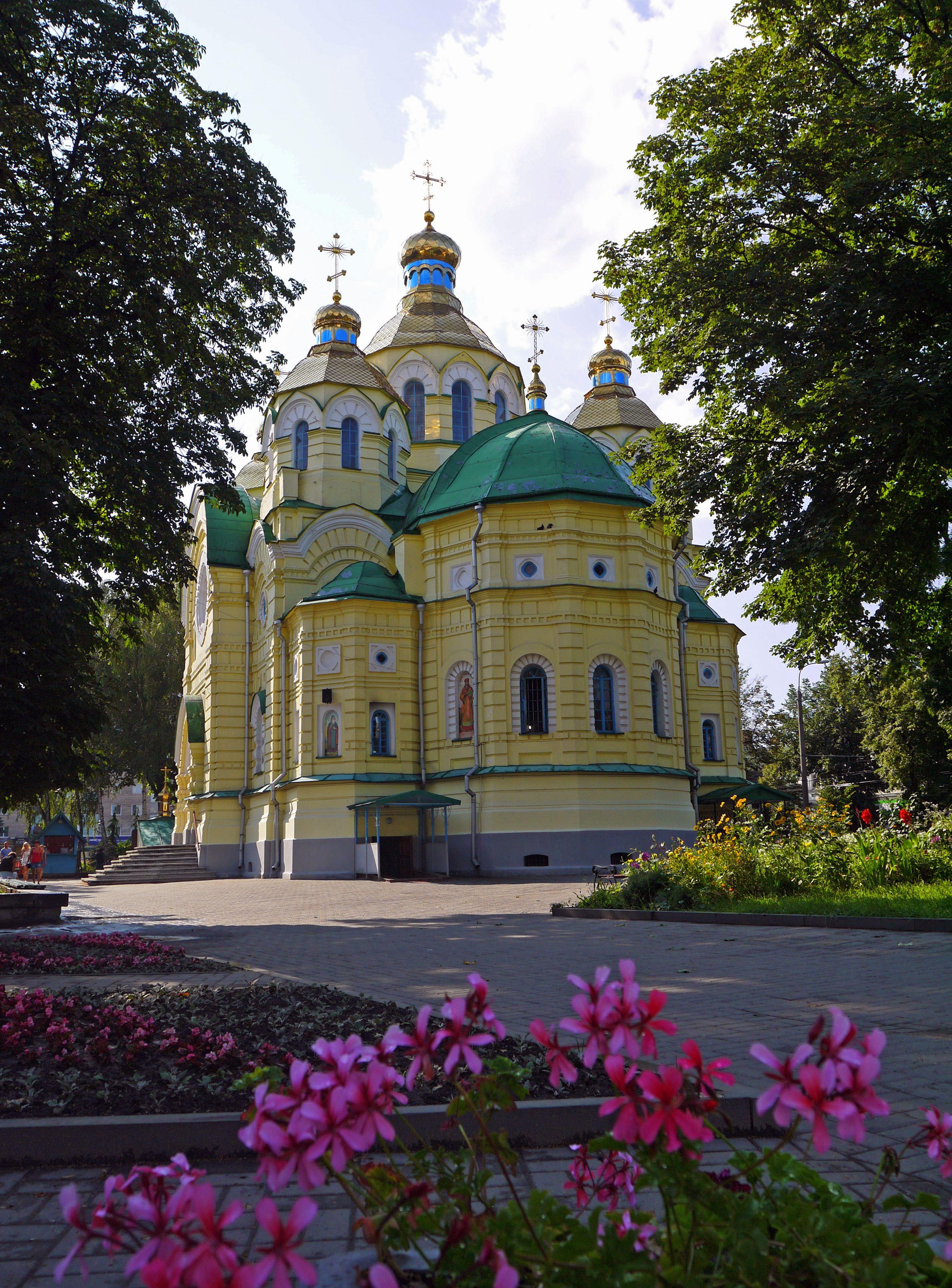 Воскресенський собор (мур.), Рівне, вул.Соборна